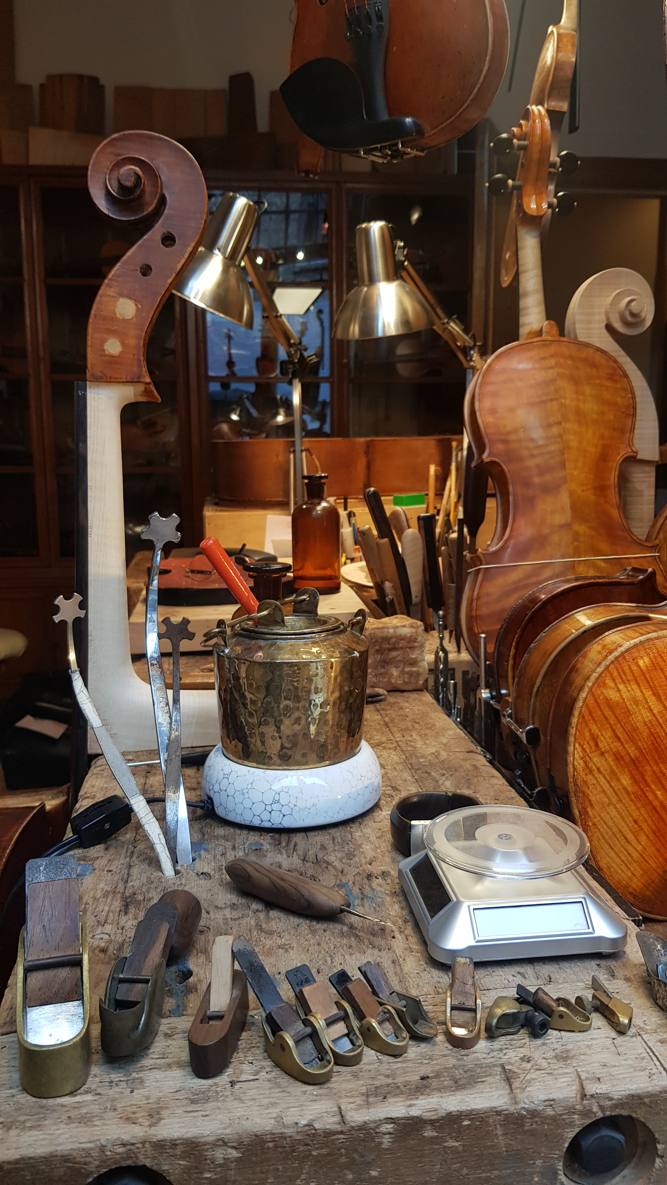 Vue sur le plan de travail d'un luthier à Maastricht.